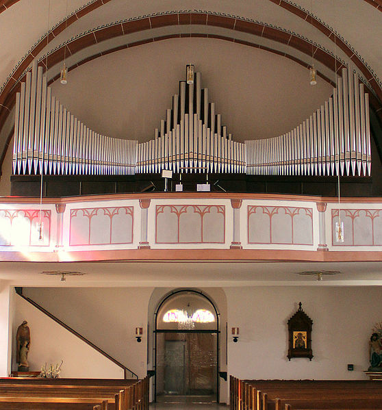 Blick ins Innere der katholischen Pfarr- und Wallfahrtskirche St. Josef in Riegelsberg, Regionalverband Saarbrücken, Saarland